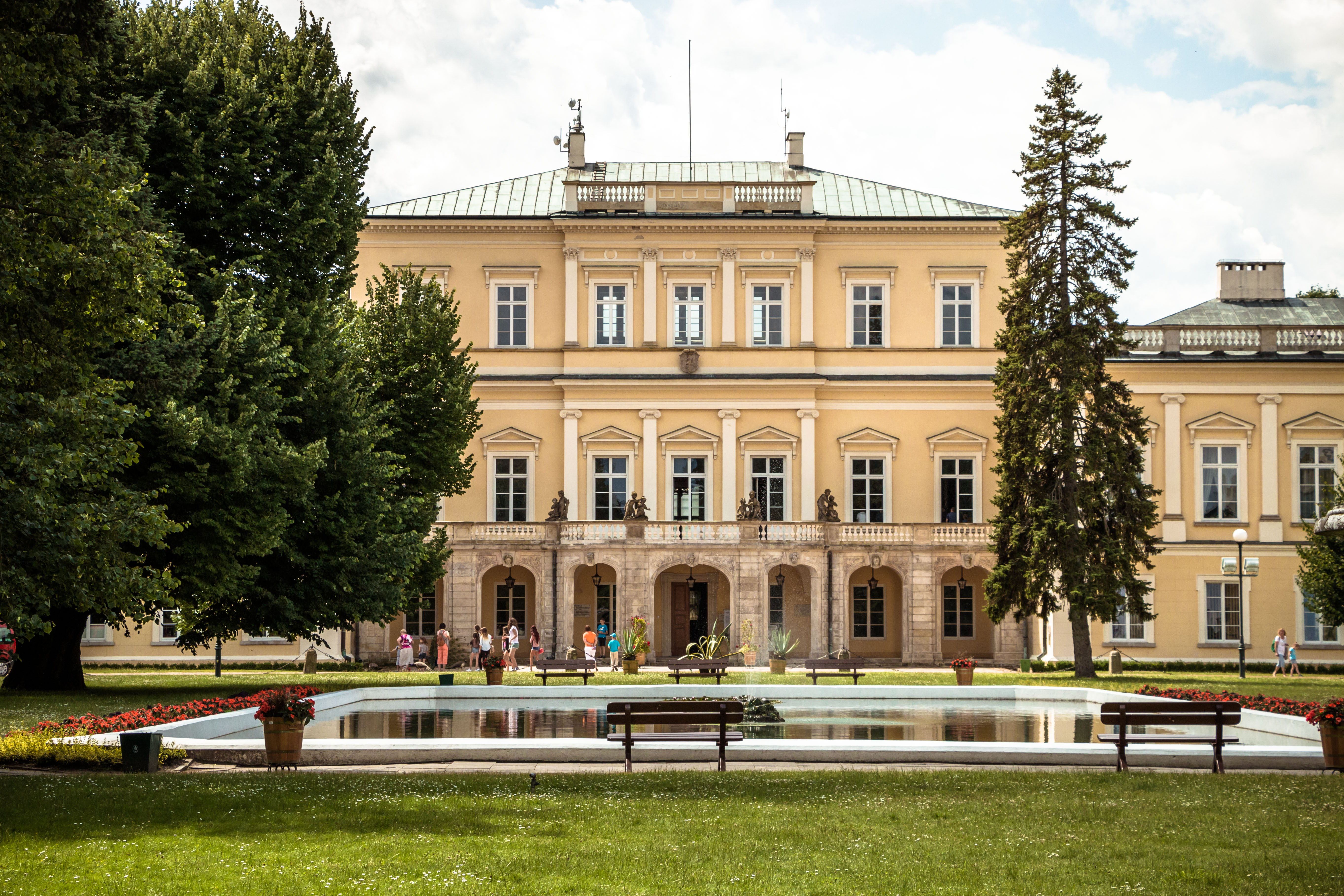 Puławy, pałac, XVII, XIX